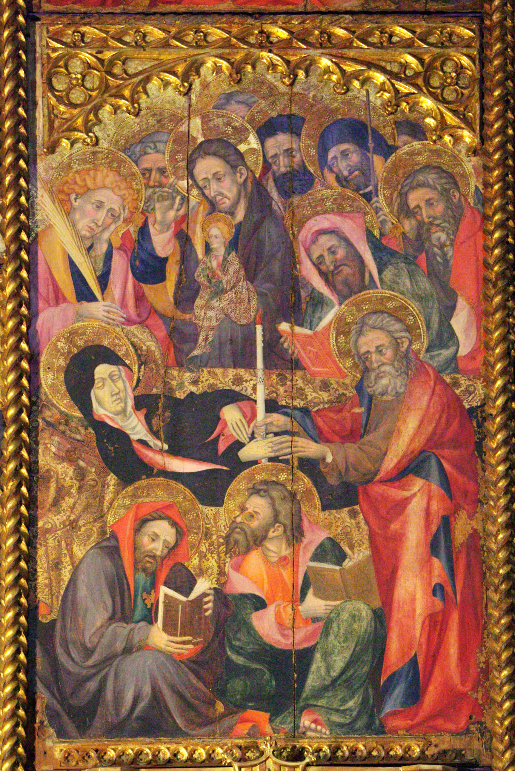 Taula de la Dormició de la Verge de l'antic retaule gòtic del Monestir de Santes Creus. Actualment està muntat sobre una nova estructura formant un retaule més petit a la catedral de Tarragona